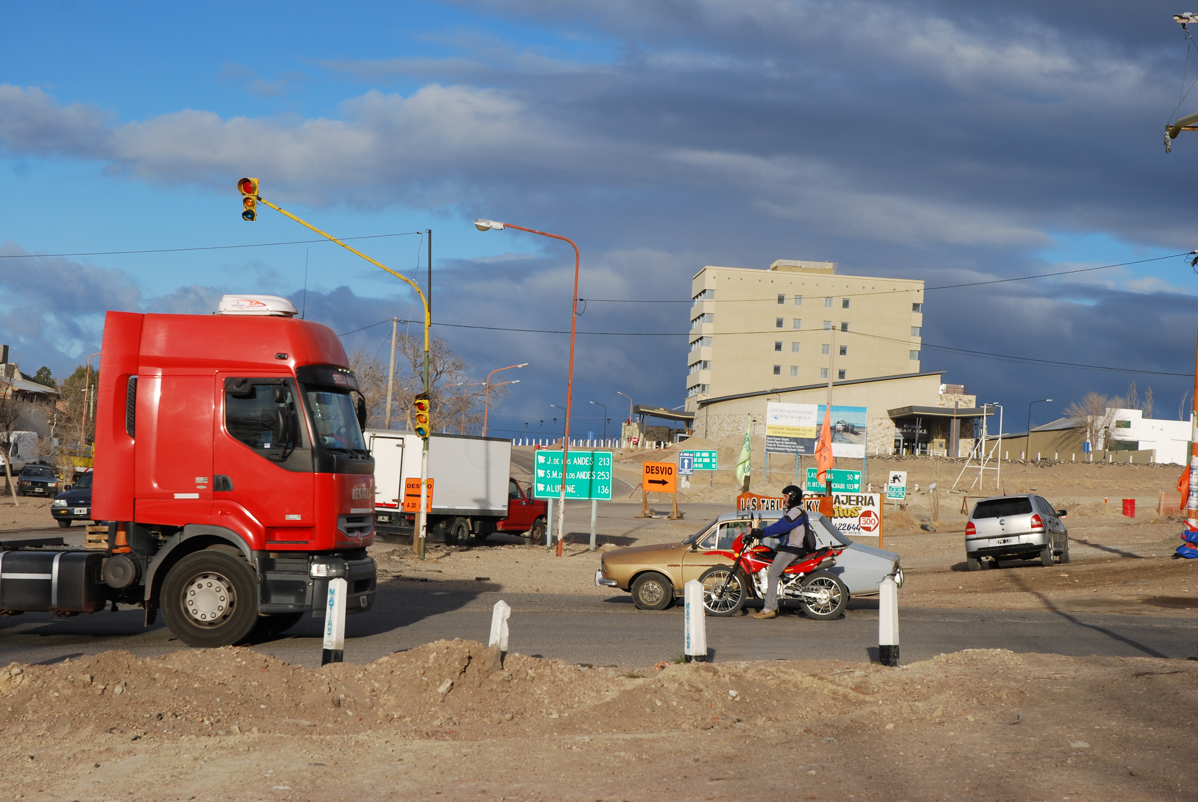 Vista del ingreso al sector oeste de la ciudad de Zapala, provincia del Neuquen.